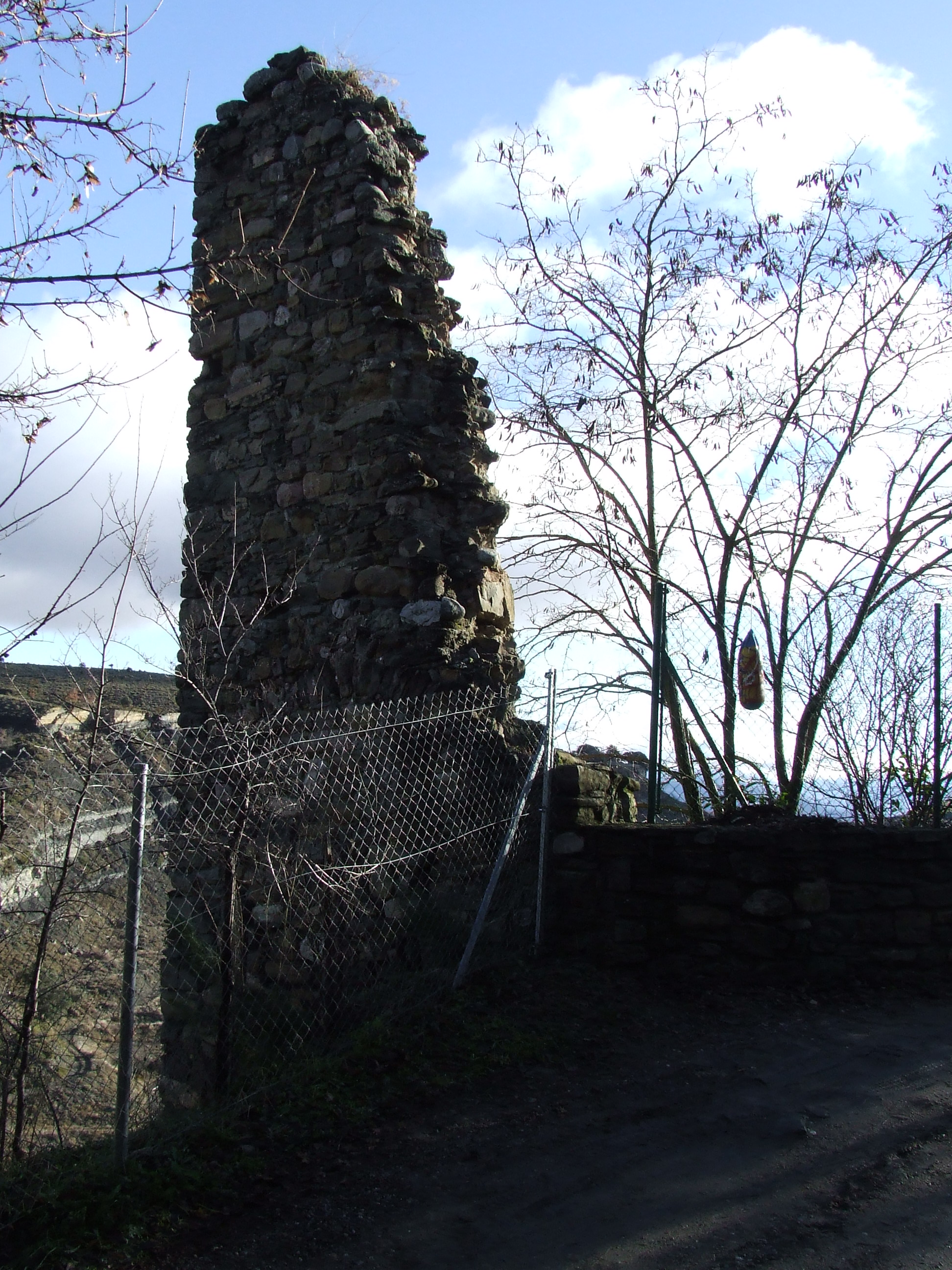 Úniques restes que queden del Castell d'Eroles (Fígols de Tremp, Tremp, Pallars Jussà)